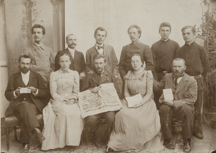 Organizers of the first Lithuanian-language theater performance Amerika pirtyje in 1899 in Palanga. From left, sitting: Žalnieriukynas, Jadvyga Juškytė, Liudas Vaineikis, Stanislava Jakševičiūtė-Venclauskienė, Feliksas Janušis. From left, standing: Vladislovas Mongirdas, Empacheris, Augustinas Janulaitis, Povilas Višinskis, Gabalis and Stanislovas Kuizinas.